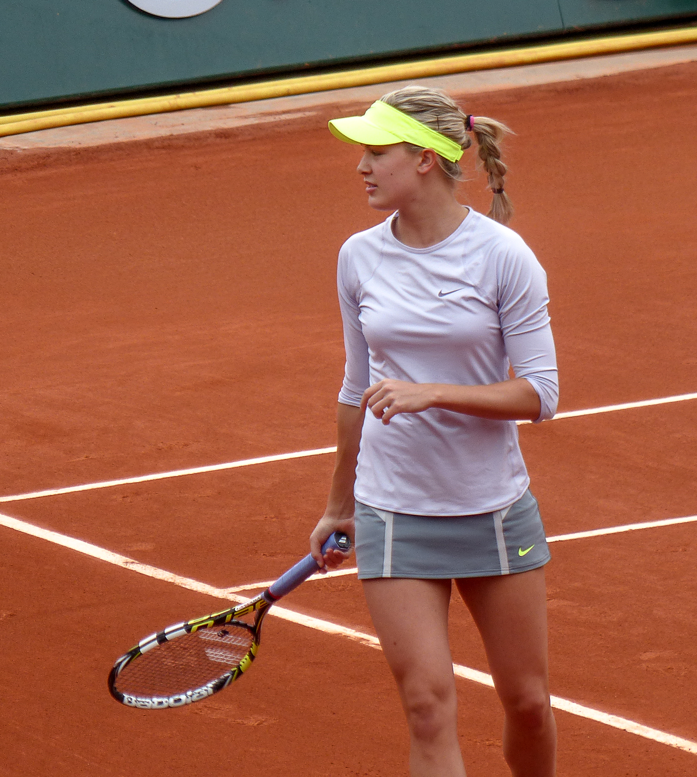 2ème tour Roland Garros 2013: Maria Sharapova (RUS) vs Eugenie Bouchard (CAN)